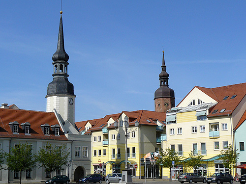 Marktplatz mit Rathaus, im Hintergrund die Kreuzkirche von Spremberg, Brandenburg, Deutschland